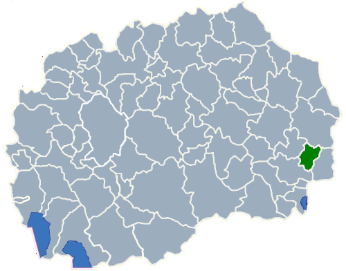 Map of Opština Bosilovo (Босилово)